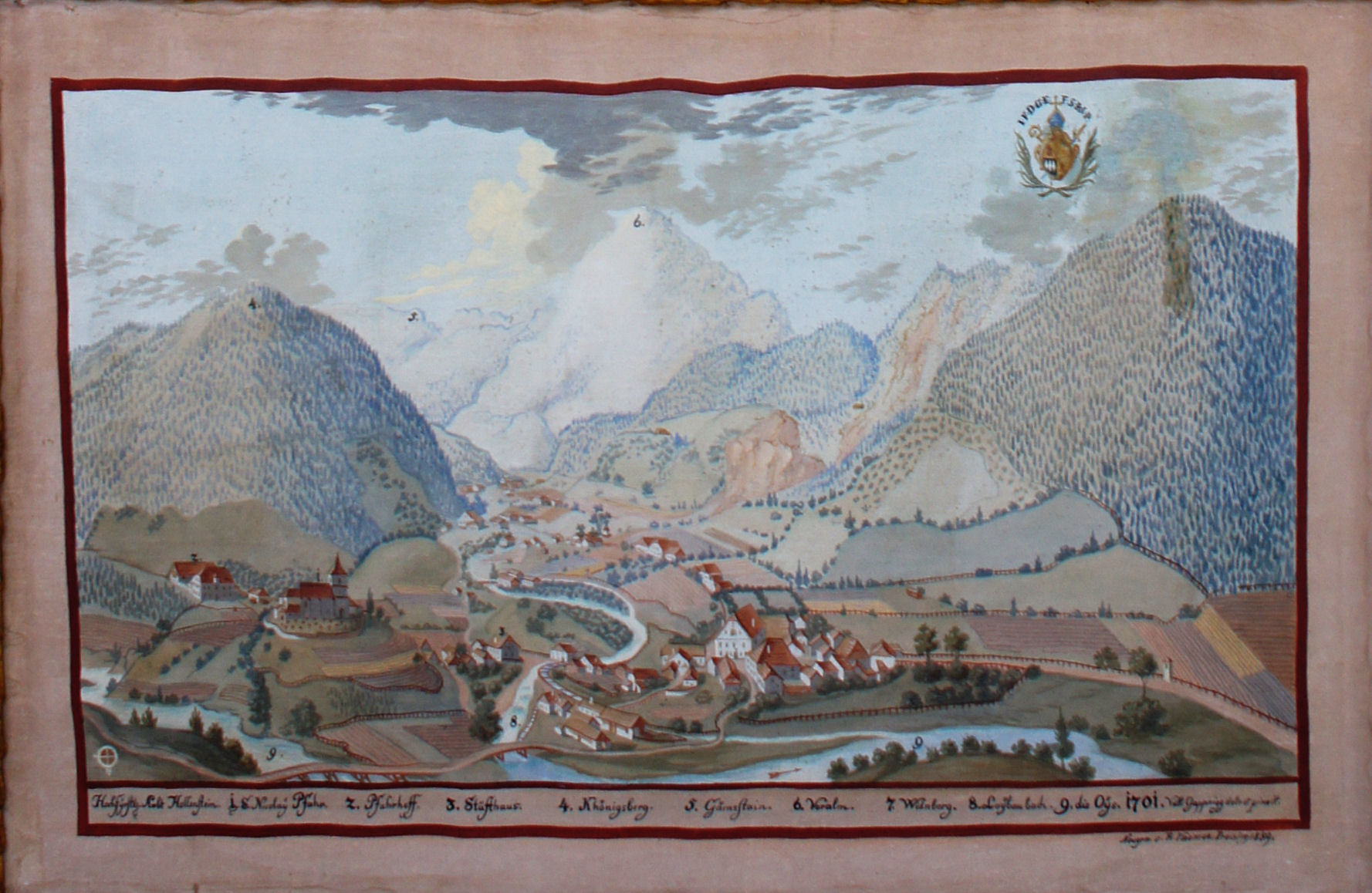 Gemälde aus einer Serie mit Darstellungen von Besitztümern des Hochstifts Freising im Fürstengang zwischen Fürstbischöflicher Residenz und Freisinger Dom.